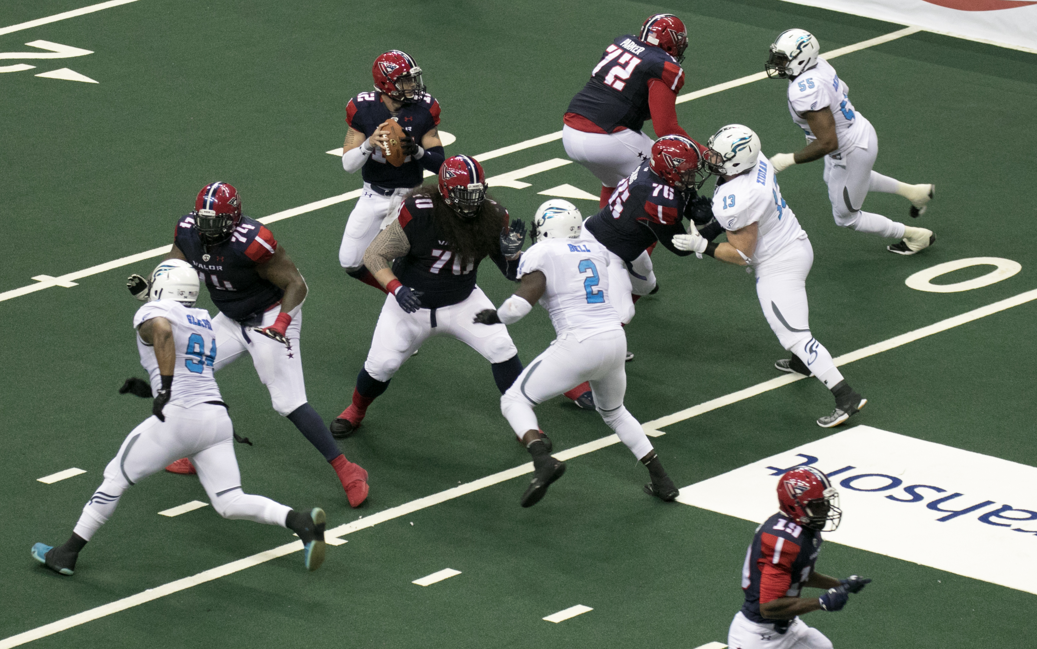 Valor 47 / Philadelphia Soul 48